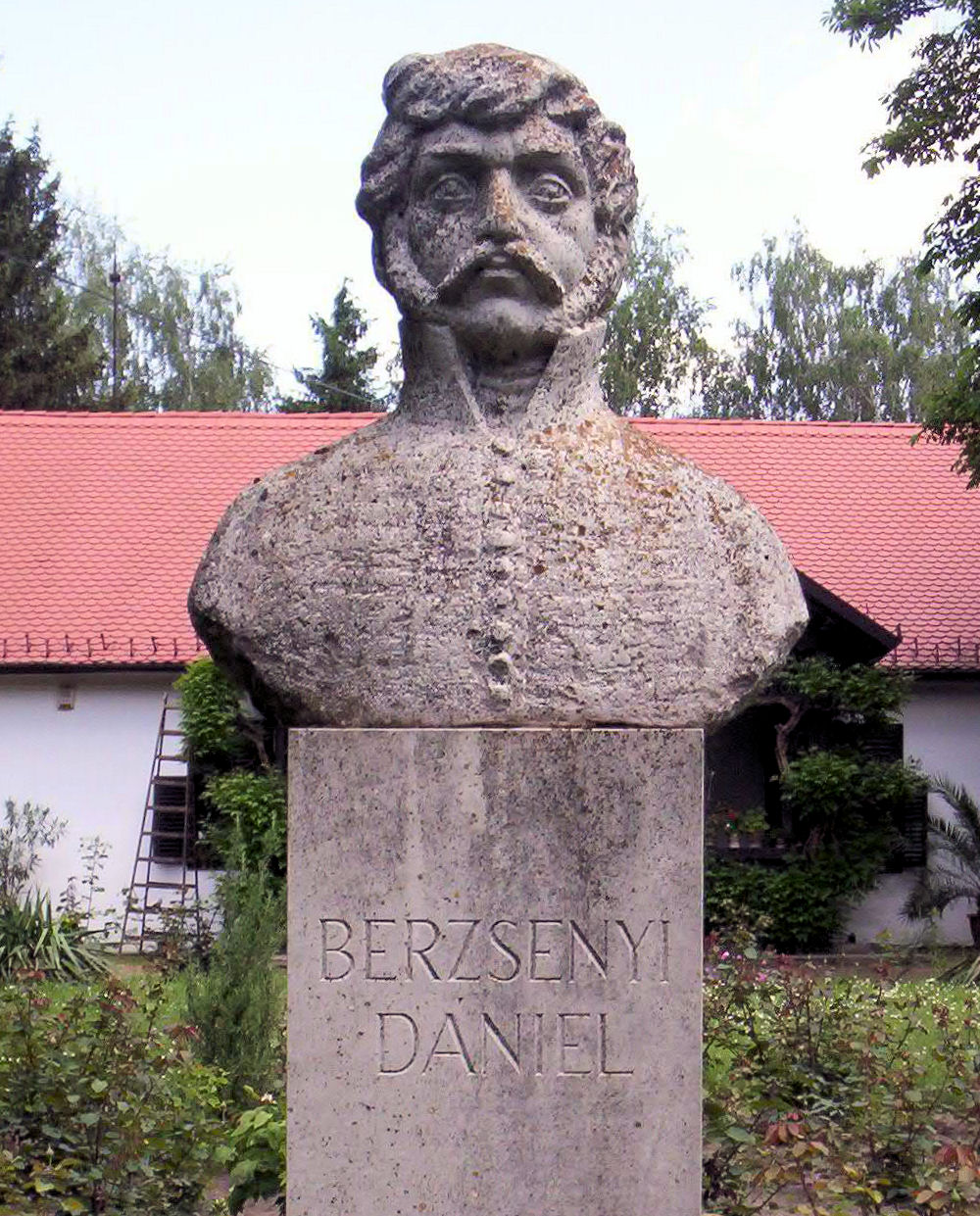 Berzsenyi Dániel szobra a niklai Berzsenyi Emlékmúzeum kertjében. Rieger Tibor alkotása (1976) – photo taken by uploader User:Csanády